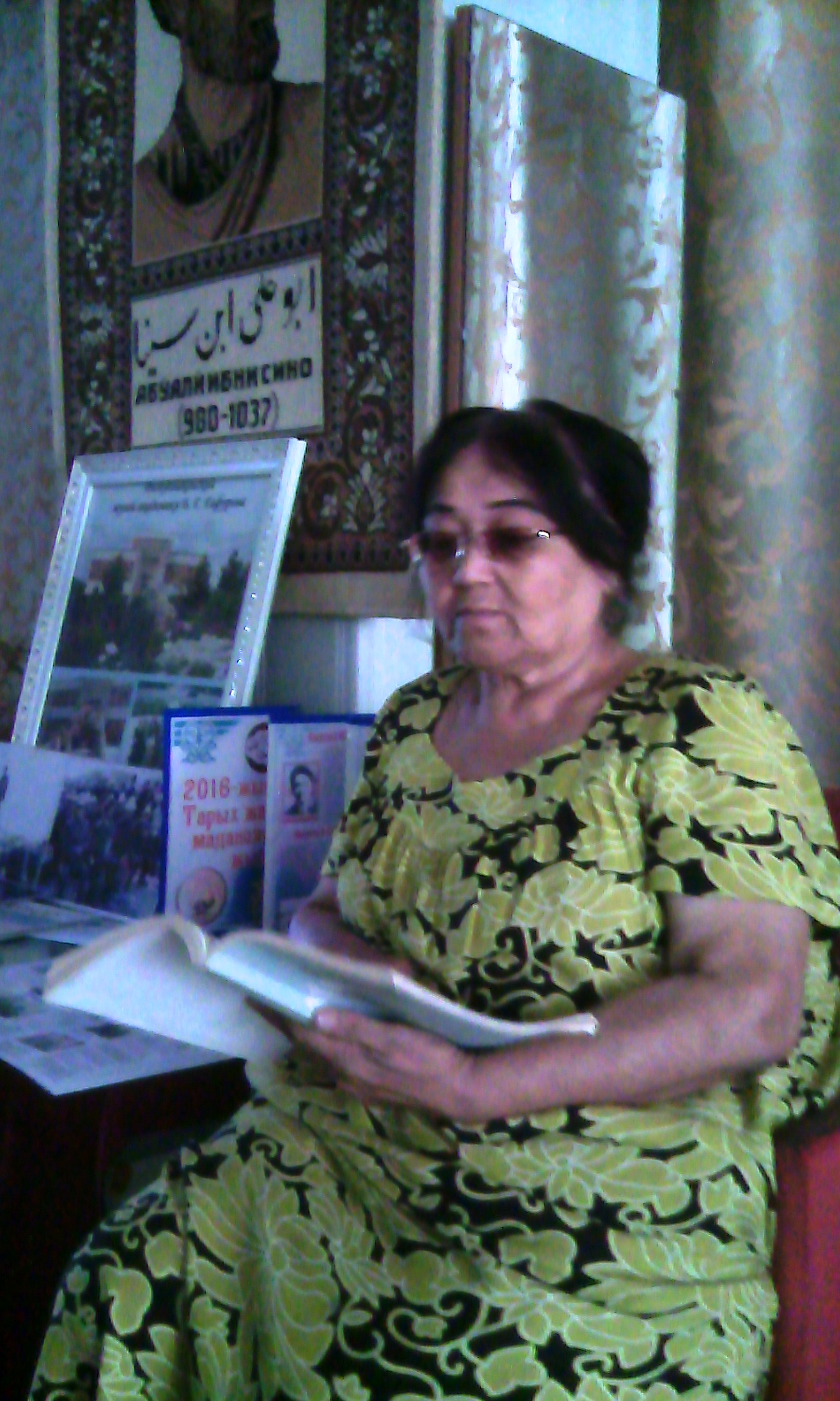 Тоҷикӣ: Мавлуда Журахон, журналист ва нависандаи ӯзбекзабон, Исфисор, ш. Ғафуров